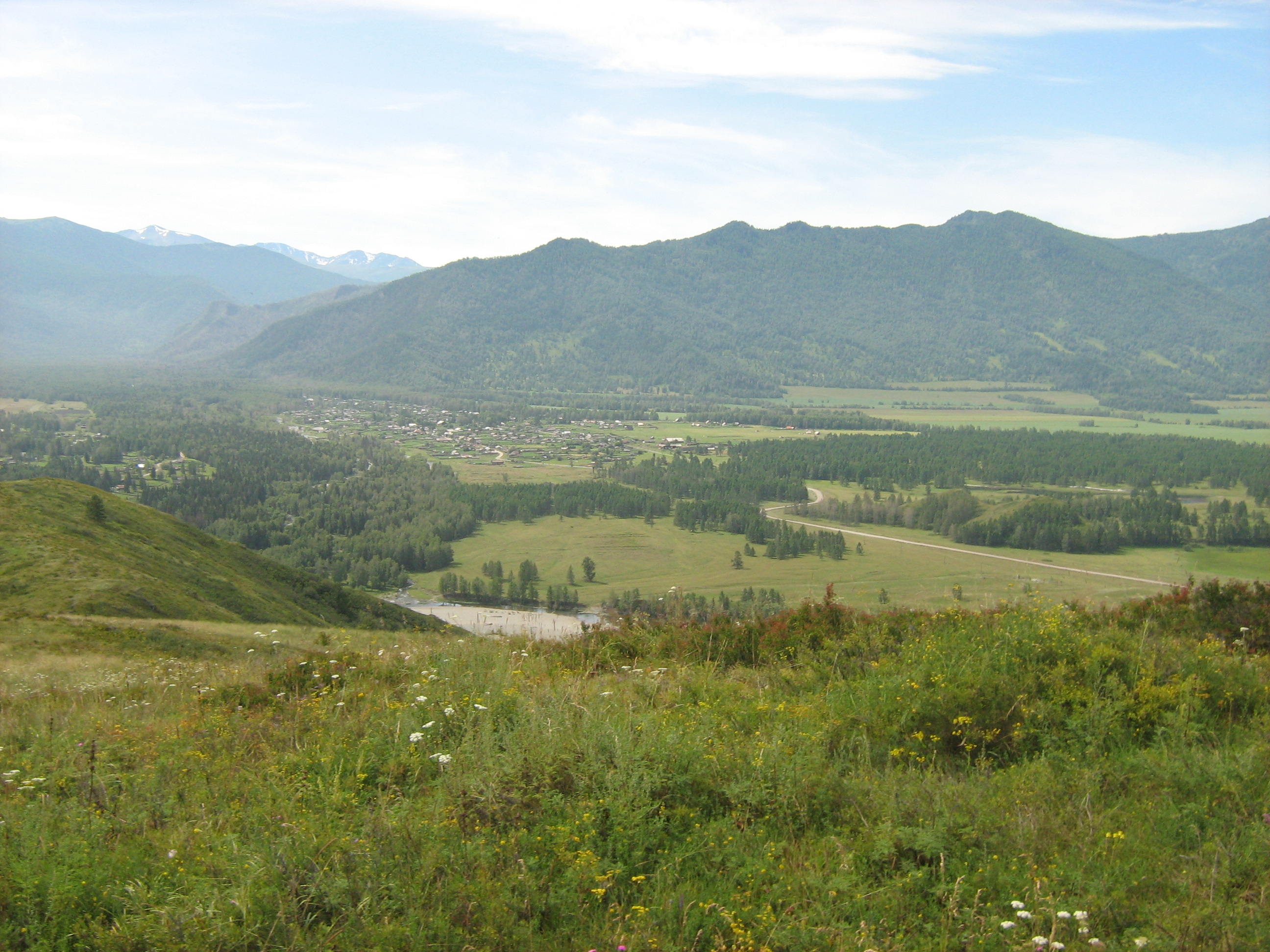 Село Мульта республики Алтай